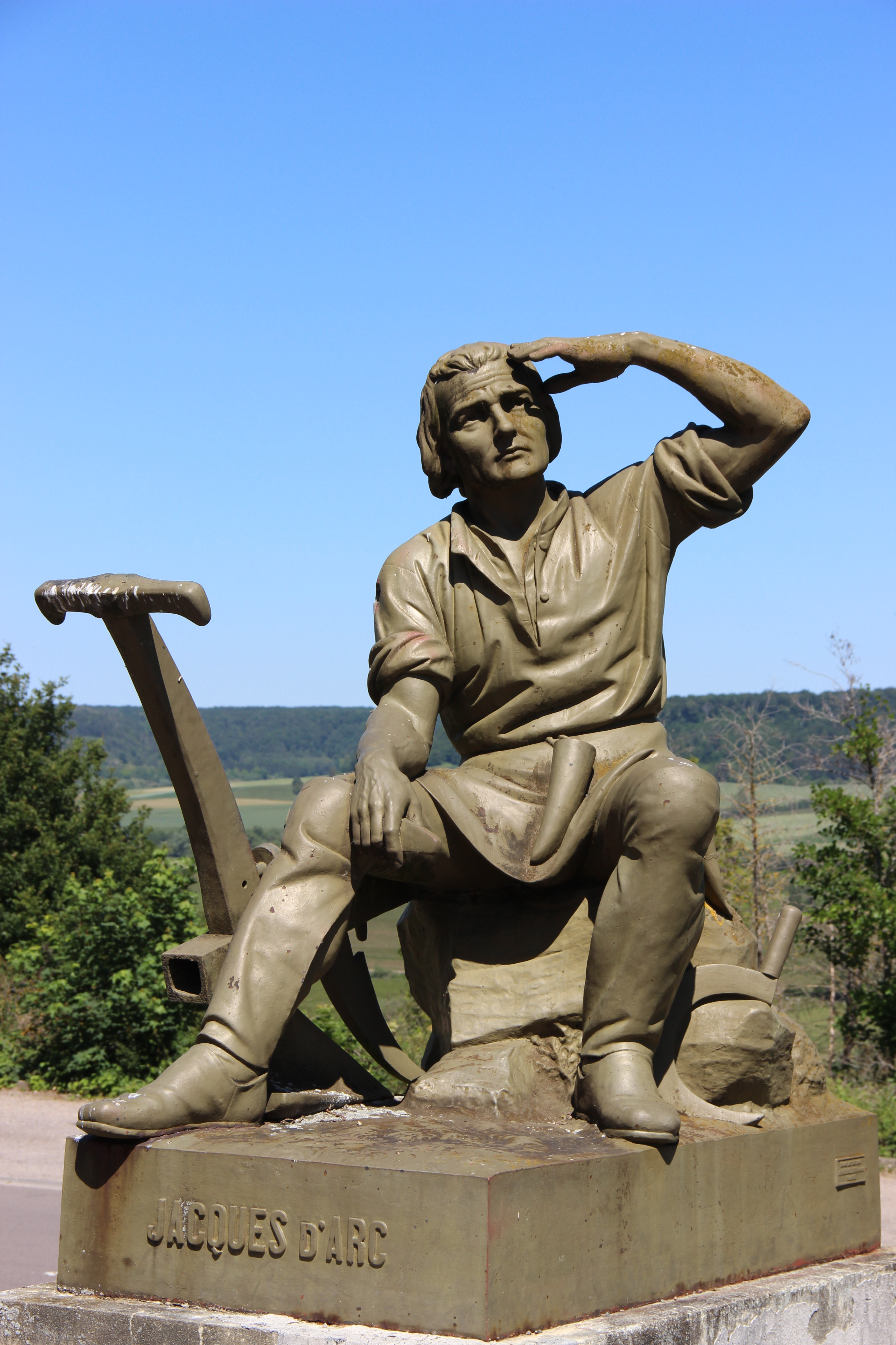 Statue de Jacques d'Arc, père de Jeanne.